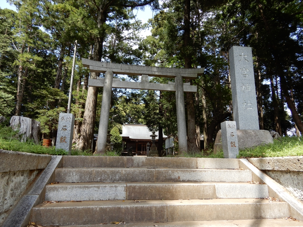 千葉市大宮神社